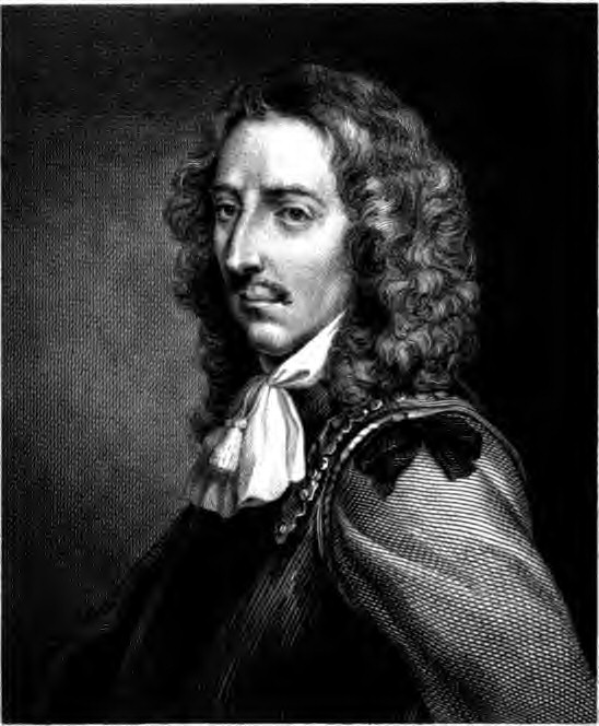 AlgernonSidney (1622-1683)